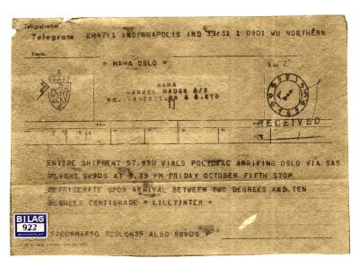 Telegram om ankomsttid for den første sendingen med poliovaksine til Norge.